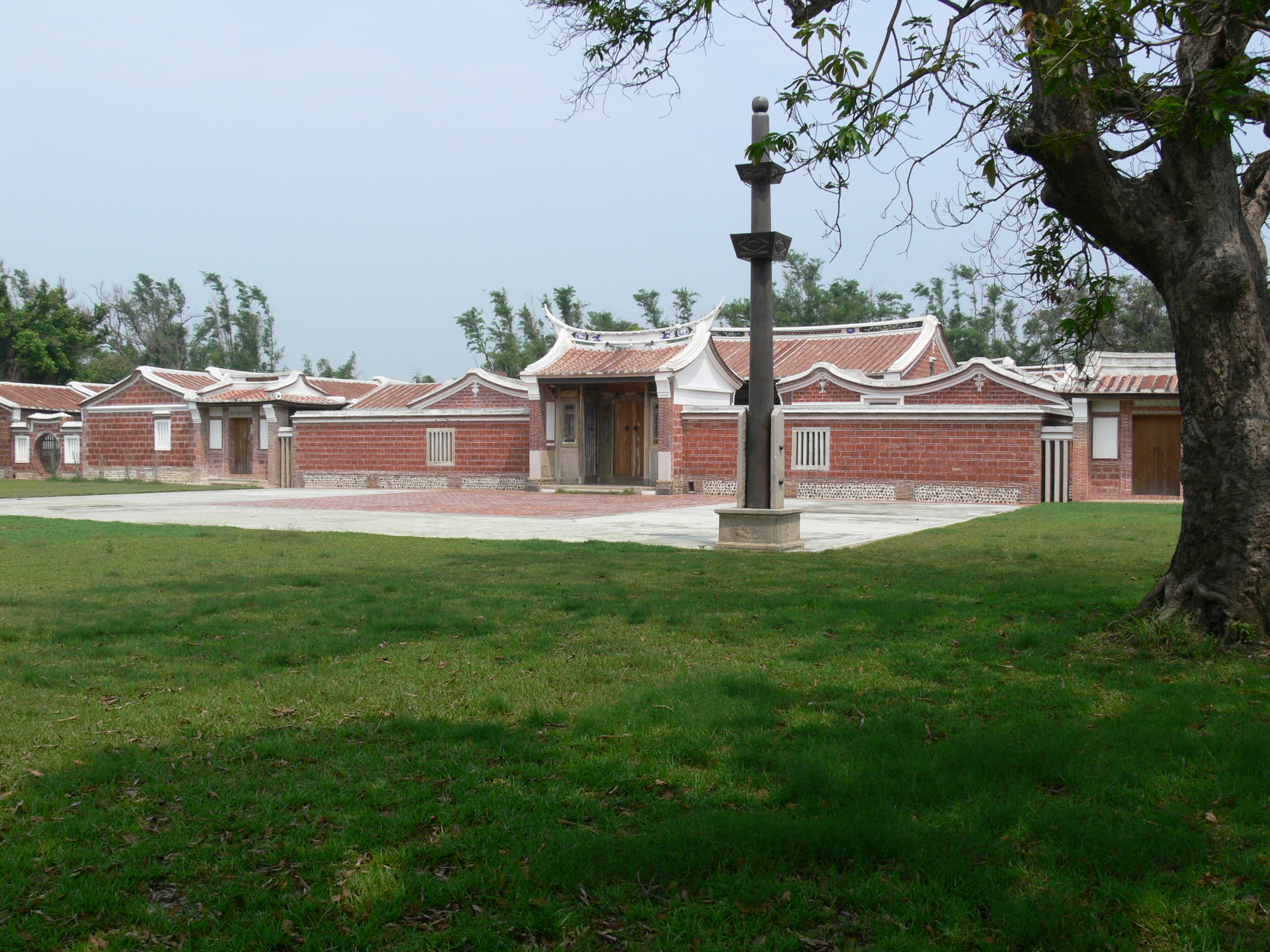 台灣 彰化縣秀水鄉益源古厝(馬興古宅)